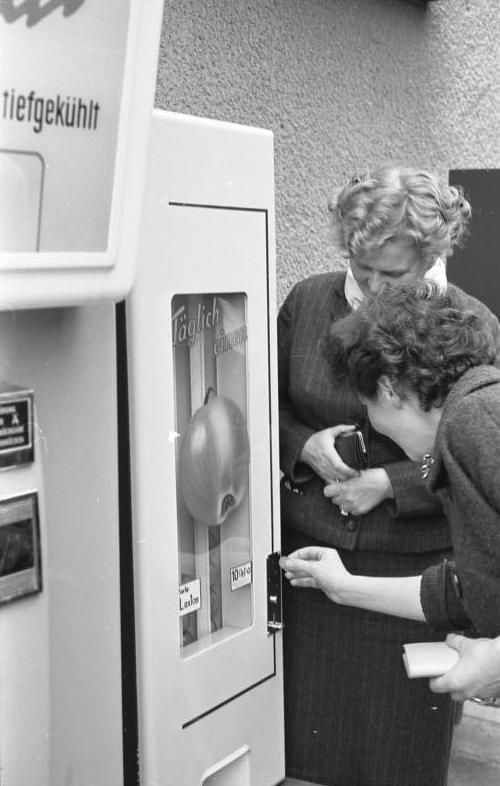 Apfel-Automaten im Bundesministerium für Ernährung